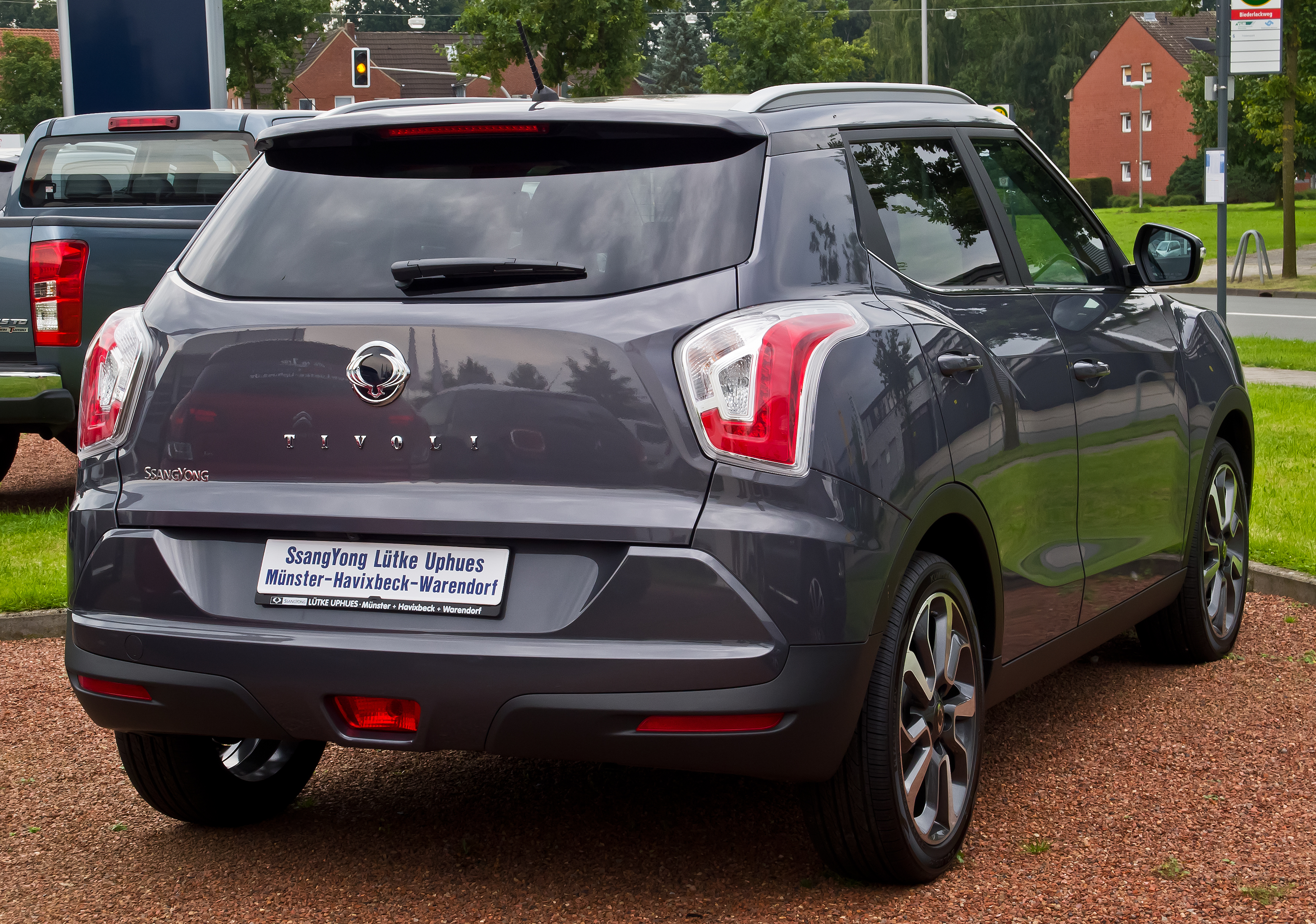 SsangYong Tivoli e-XDi 160 2WD Sapphire